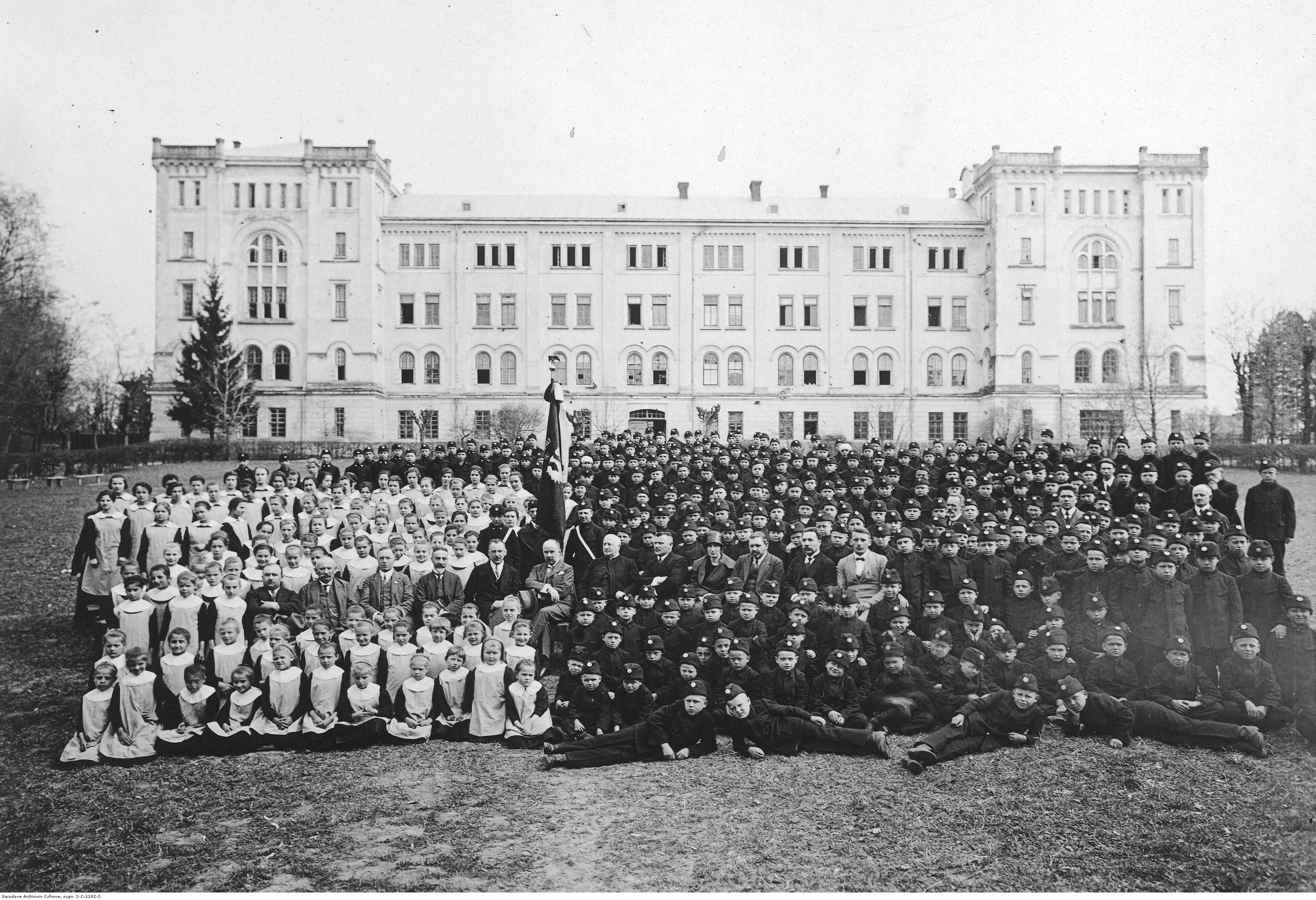 Zakład Sierot i Ubogich w Drohowyżu (1934) fotografia zbiorowa